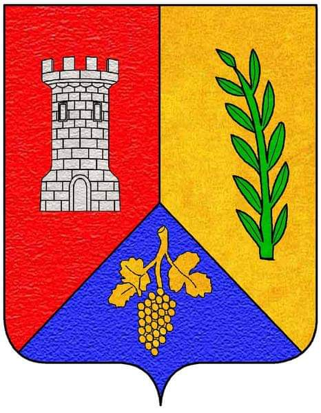 Blason de Bresnay (03) Tiercé en pairle renversé : au 1er de gueules à la tour d'argent maçonnée de sable, au 2e d'or à la feuille de frêne de sinople, au 3e d'azur à la grappe de raisin feuillée d'or.